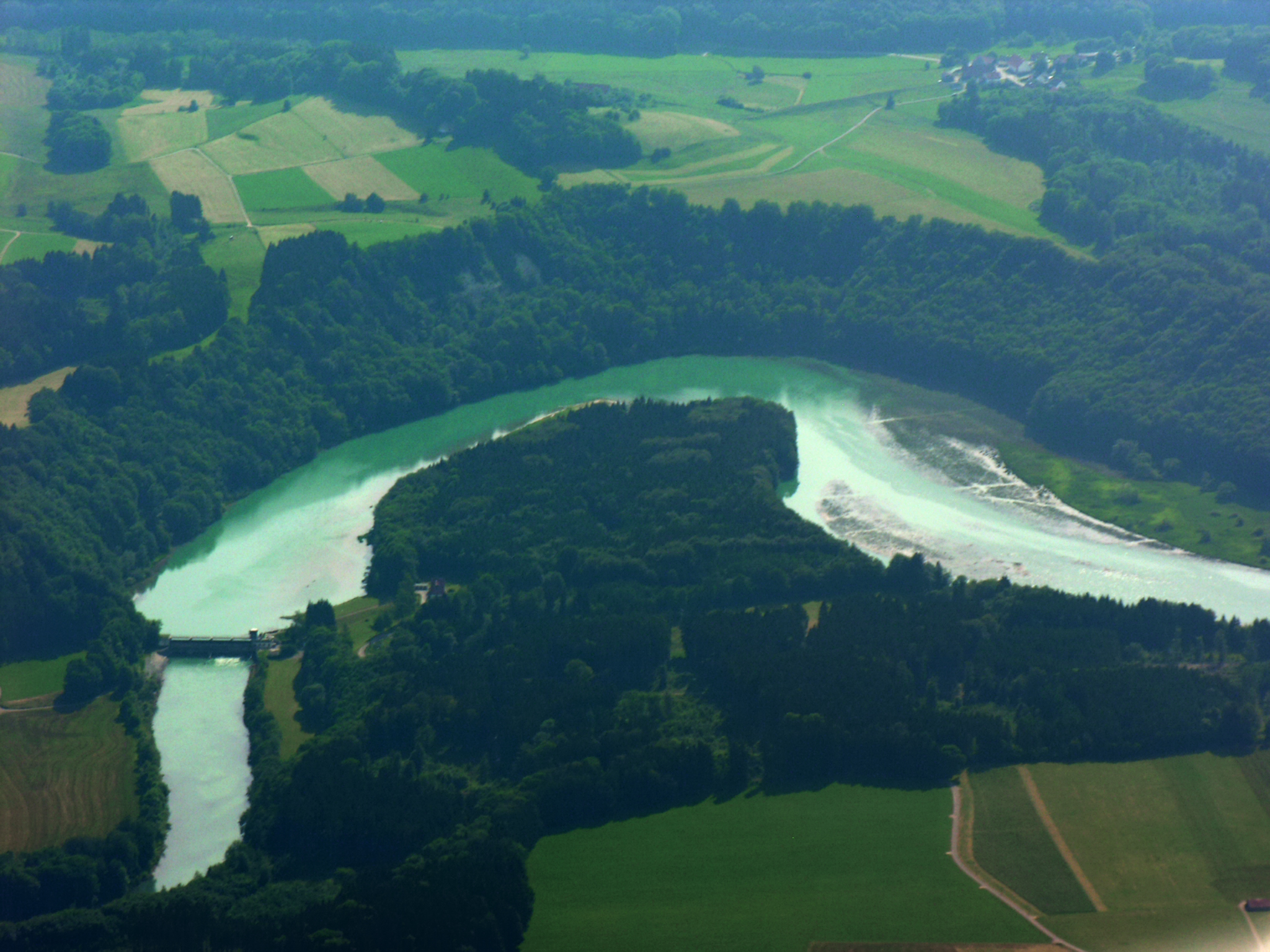 Germany, Bavaria, Iller dam near Graben